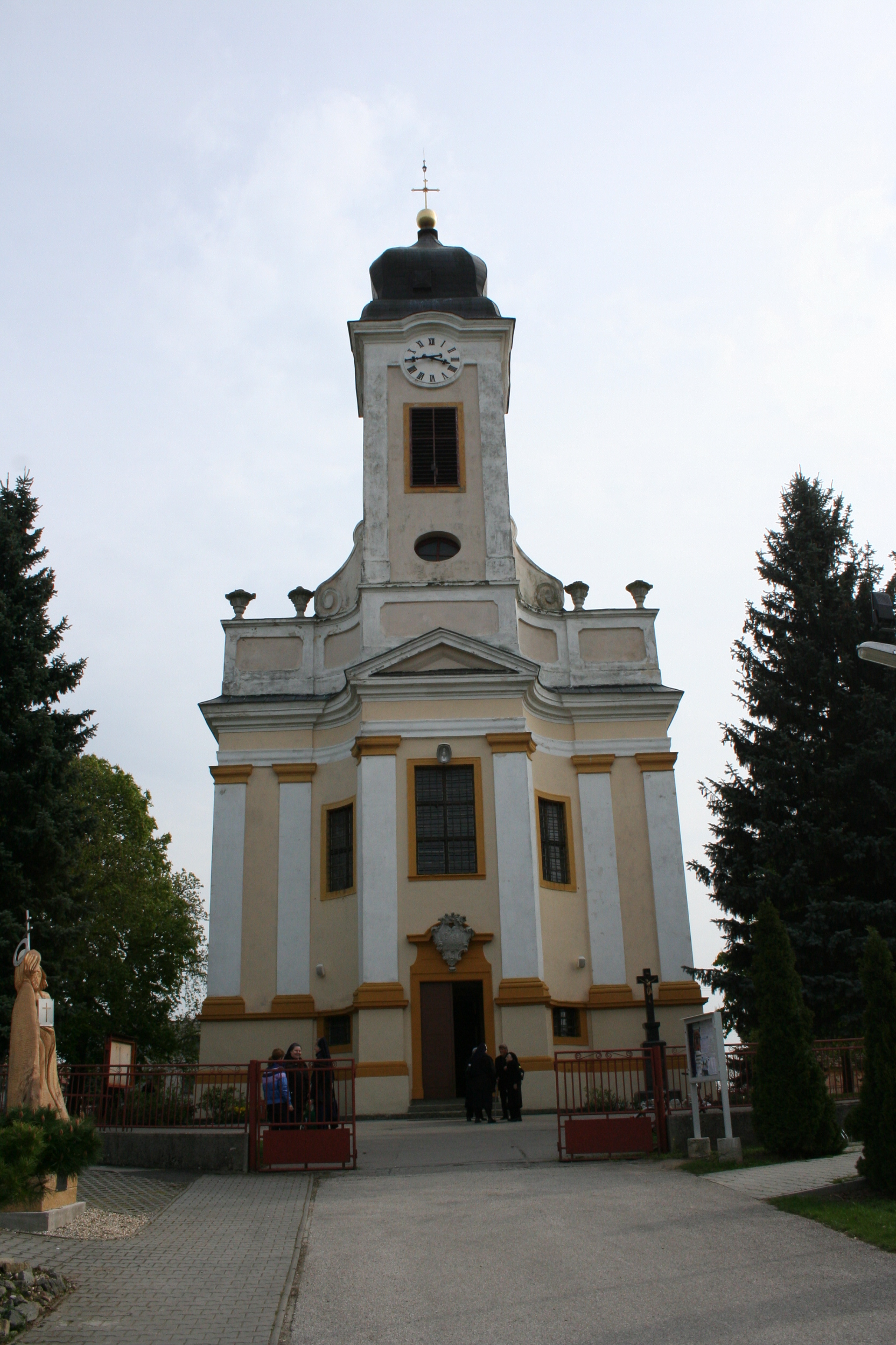 MányaSlovenčina: Rímskokatolícky kostol Sedembolestnej Panny Márie